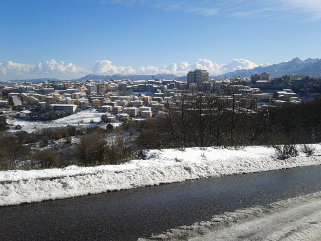 Tempio Pausania, Febbraio